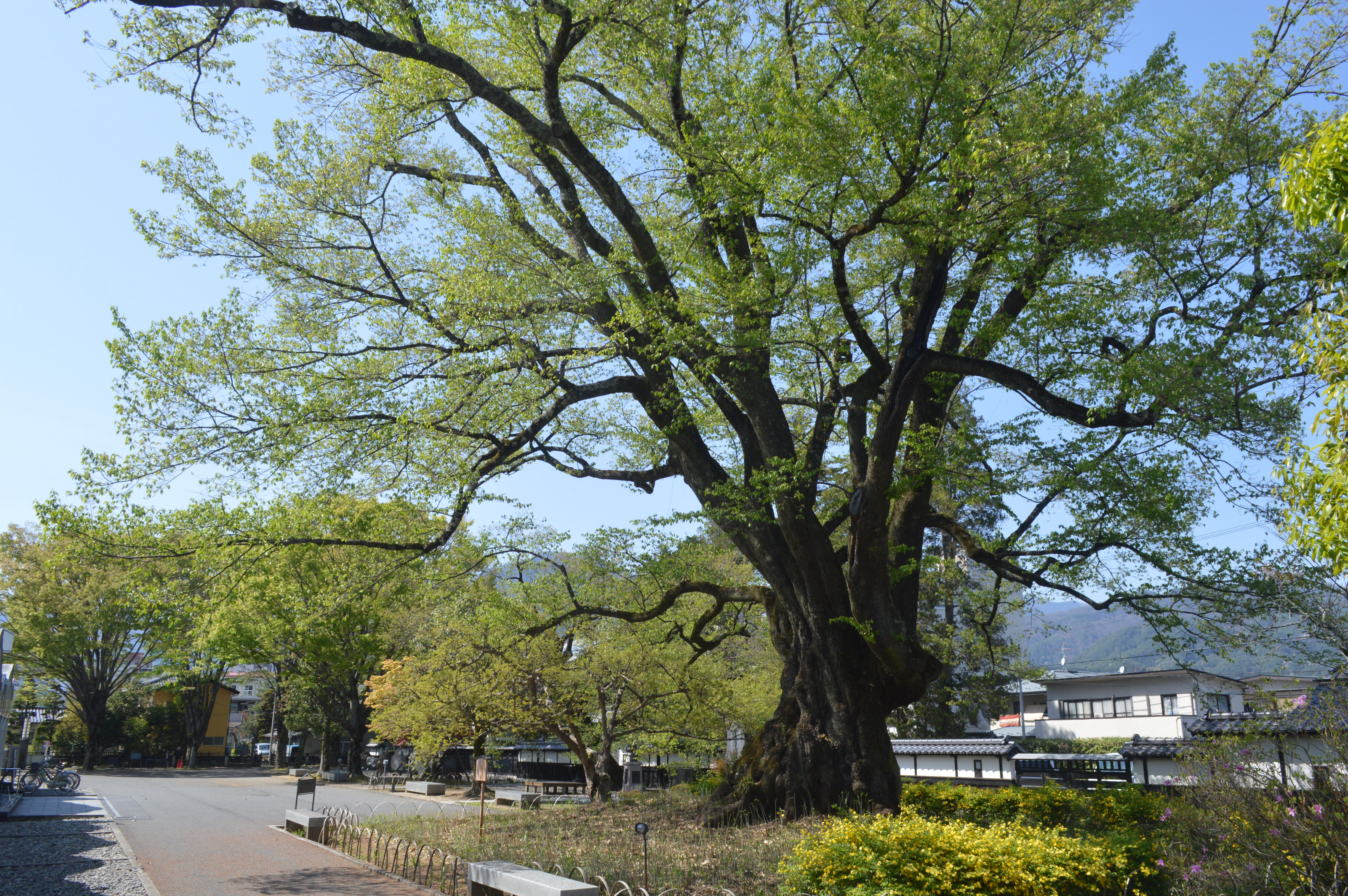 長野県飯田市の飯田市美術博物館の敷地内にある安富桜。